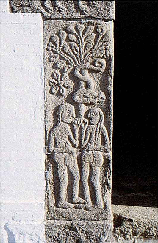 Volsted Kirke i Danmark. Portal vestre karmsten, Syndefaldet